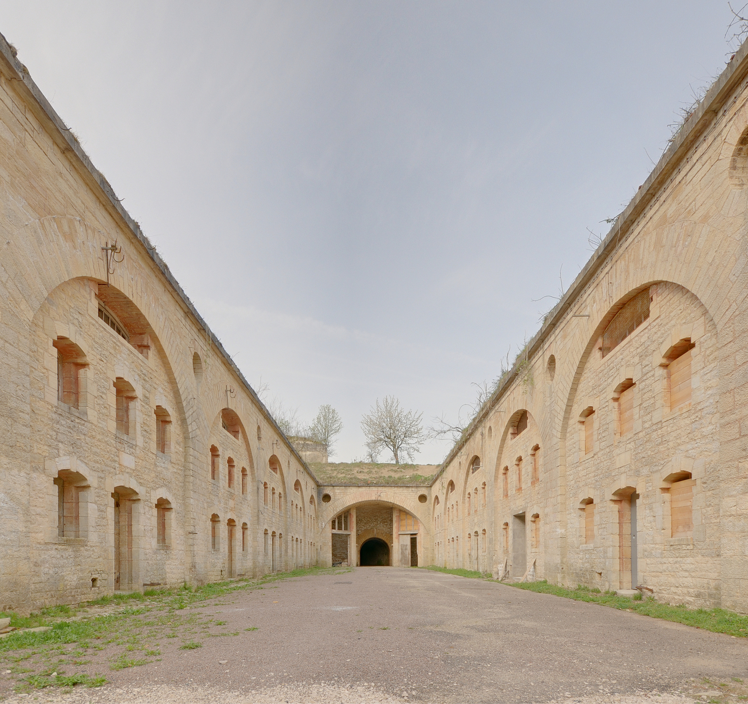 This photograph was taken with a Nikon D300 Fort de la Motte-Giron : dans la cour intérieure (HDR).